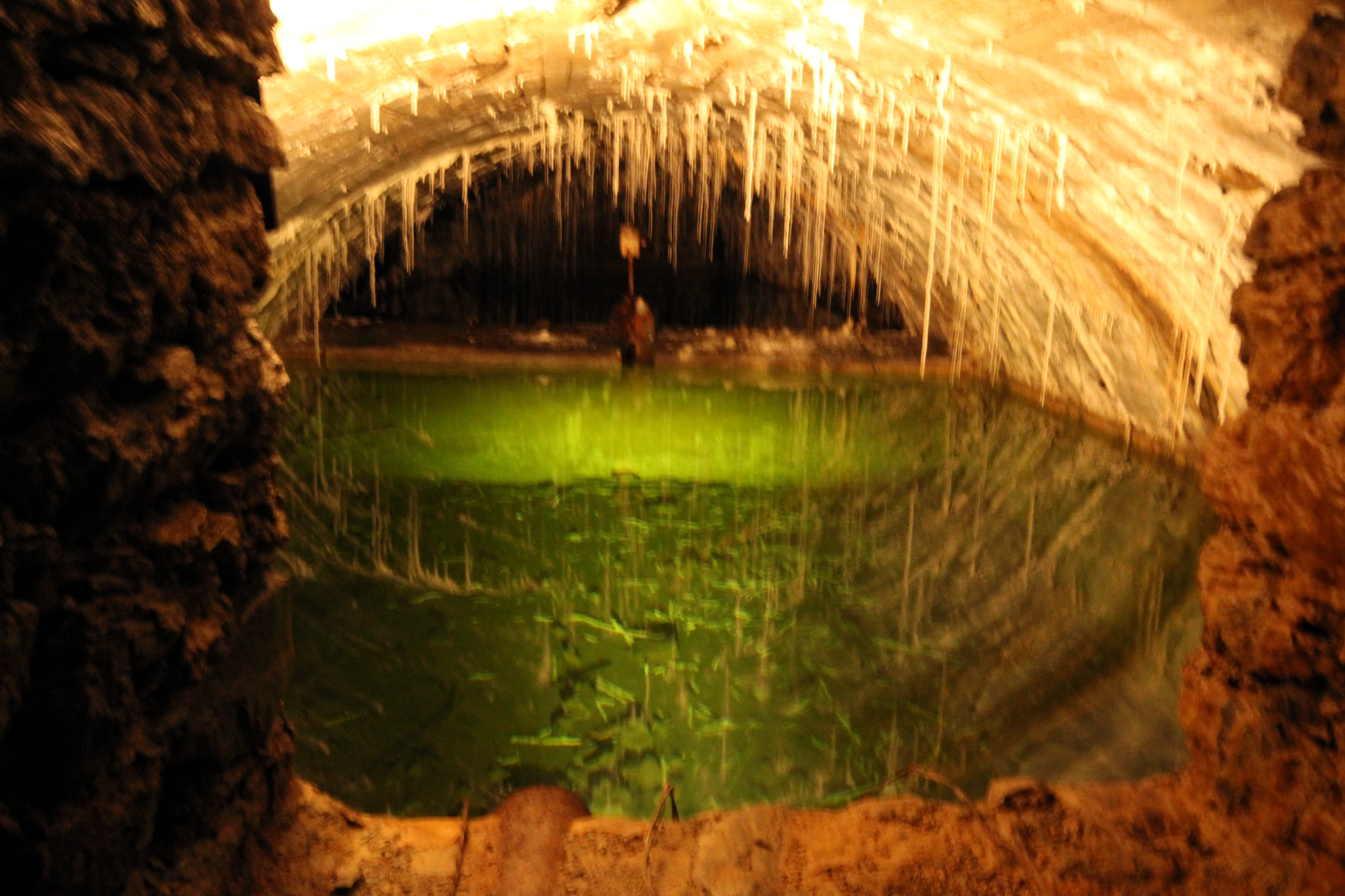 La citerne du fort du Mont.